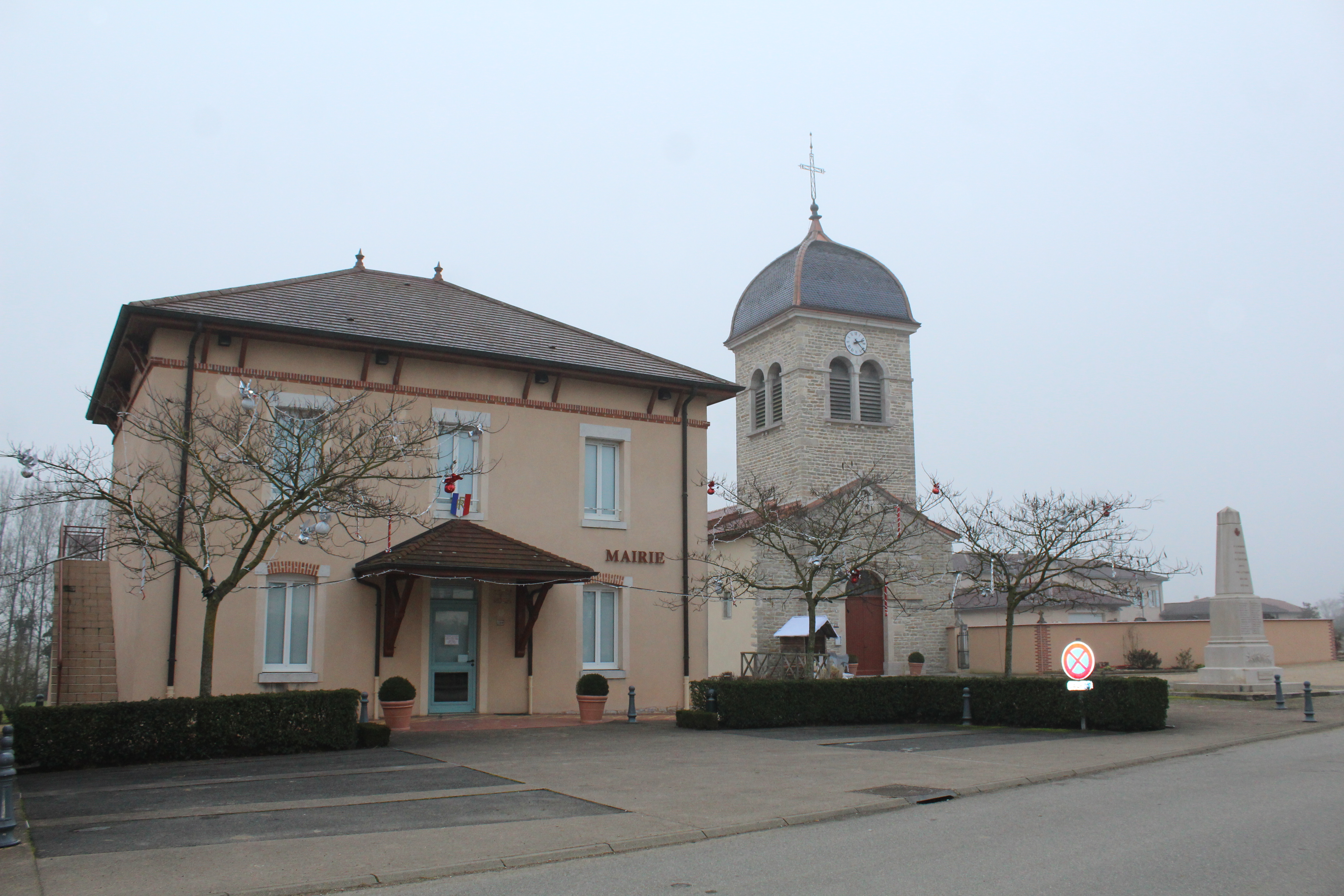 Église Saint-Clément et mairie de Curtafond.